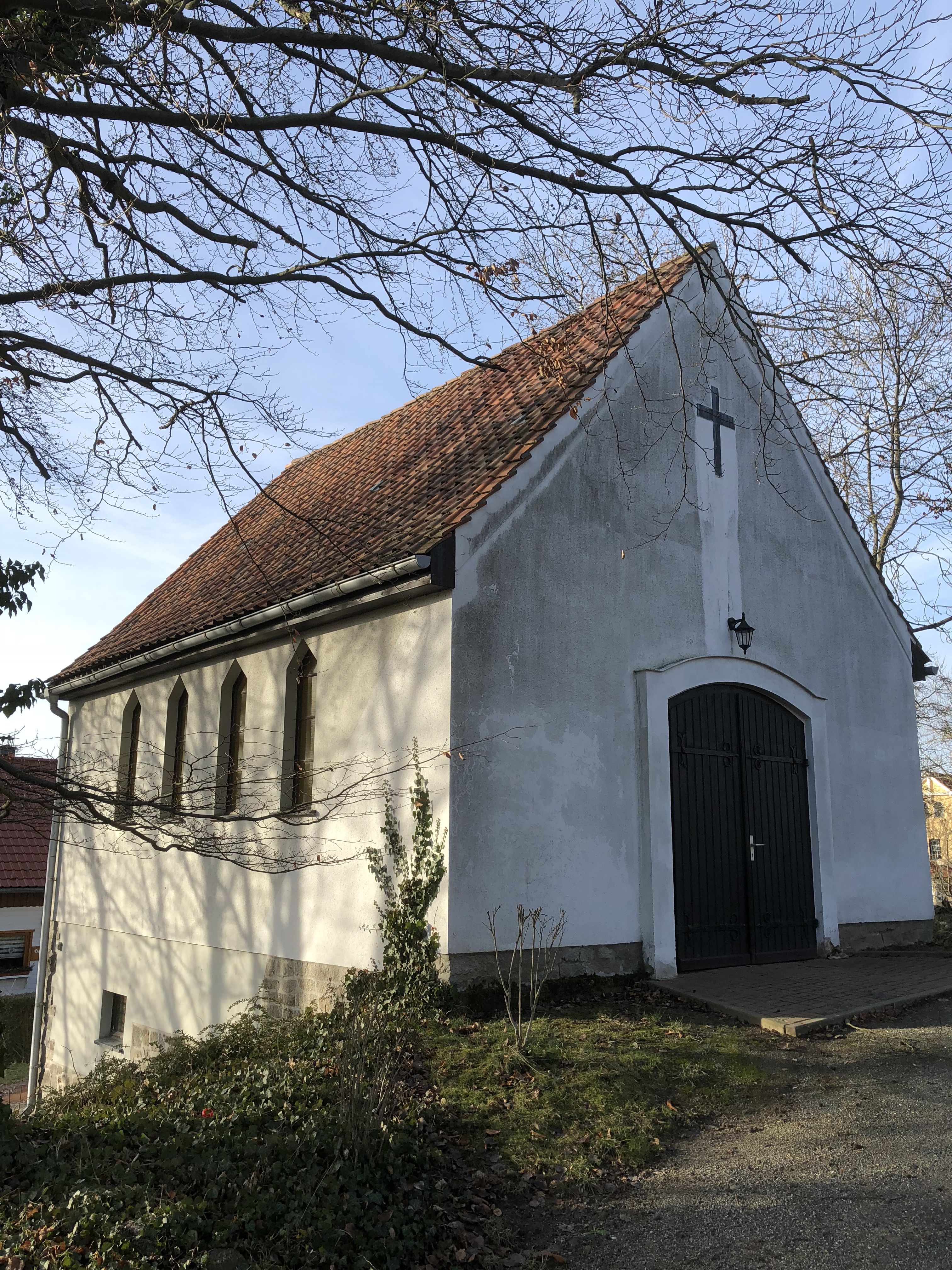 Kapelle an der Bonhoeffer-Kirche in Friedrichsbrunn